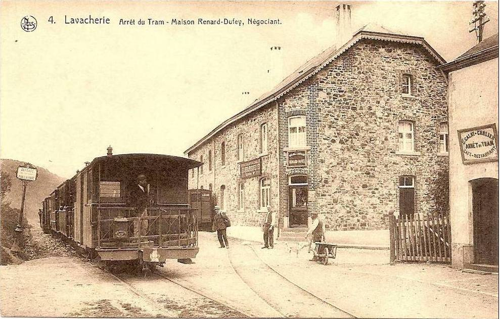 Arret du Tram vicinal à vapeur à Lavacherie,la maison de commerce Renard Dufey et la café restaurant Calay Charlier vers 1904.